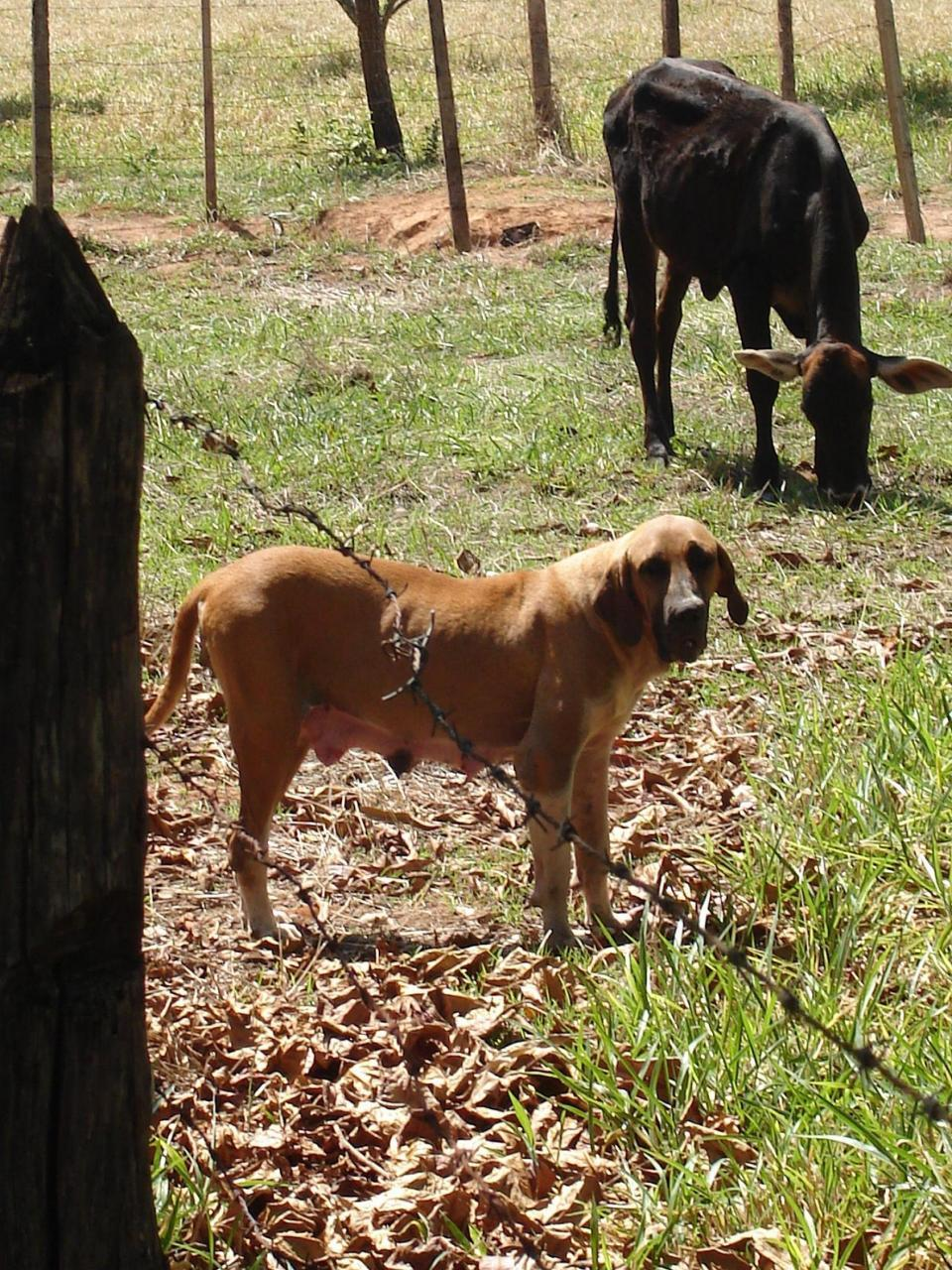 Cadela OFB (Original Fila Brasileiro) adulta cuidando do gado